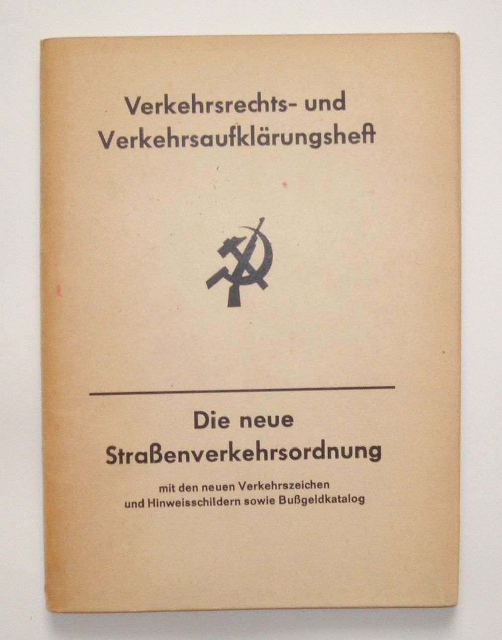 Die neue Straßenverkehrsordnung mit den neuen Verkehrszeichen und Hinweisschildern sowie Bußgeldkatalog - Verkehrsrechts- und Verkehrsaufklärungsheft. Tarnschrift der Rote Armee Fraktion unter Verwendung des Originalumschlags der bundesdeutschen Straßenverkehrsordnung. Enthält von Horst Mahler: Die Lücken der revolutionären Theorie schliessen - Die Rote Armee aufbauen! o.O., o.J., 70 Seiten, (1971). Erste Auflage (Vorsicht! Es gibt einige Nachdrucke) Spätere Ausgaben sind auch unter dem Titel Über den bewaffneten Kampf in Westeuropa erschienen